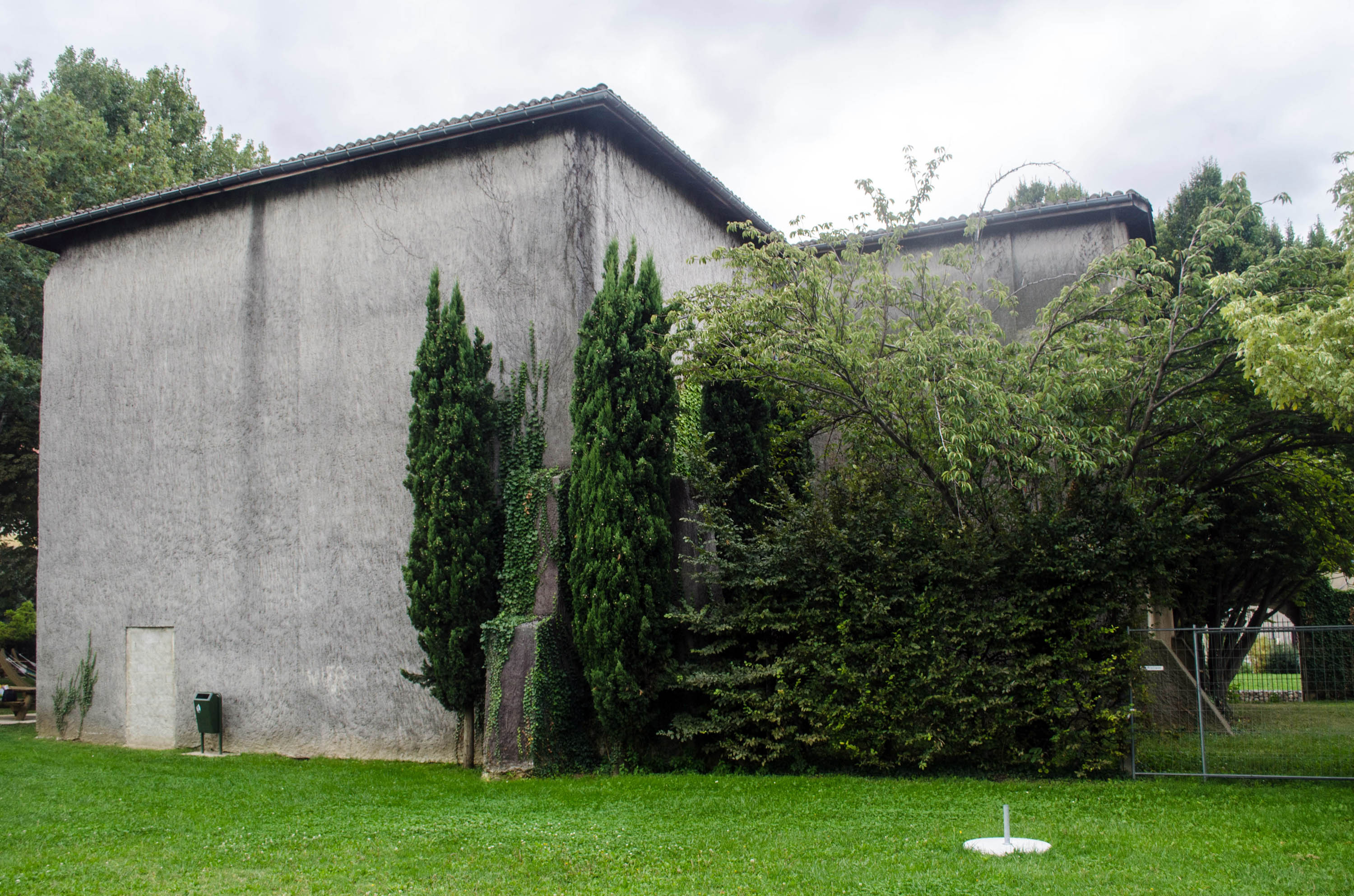 Valence (Drôme), Abbaye Notre-Dame de Soyons, chevet